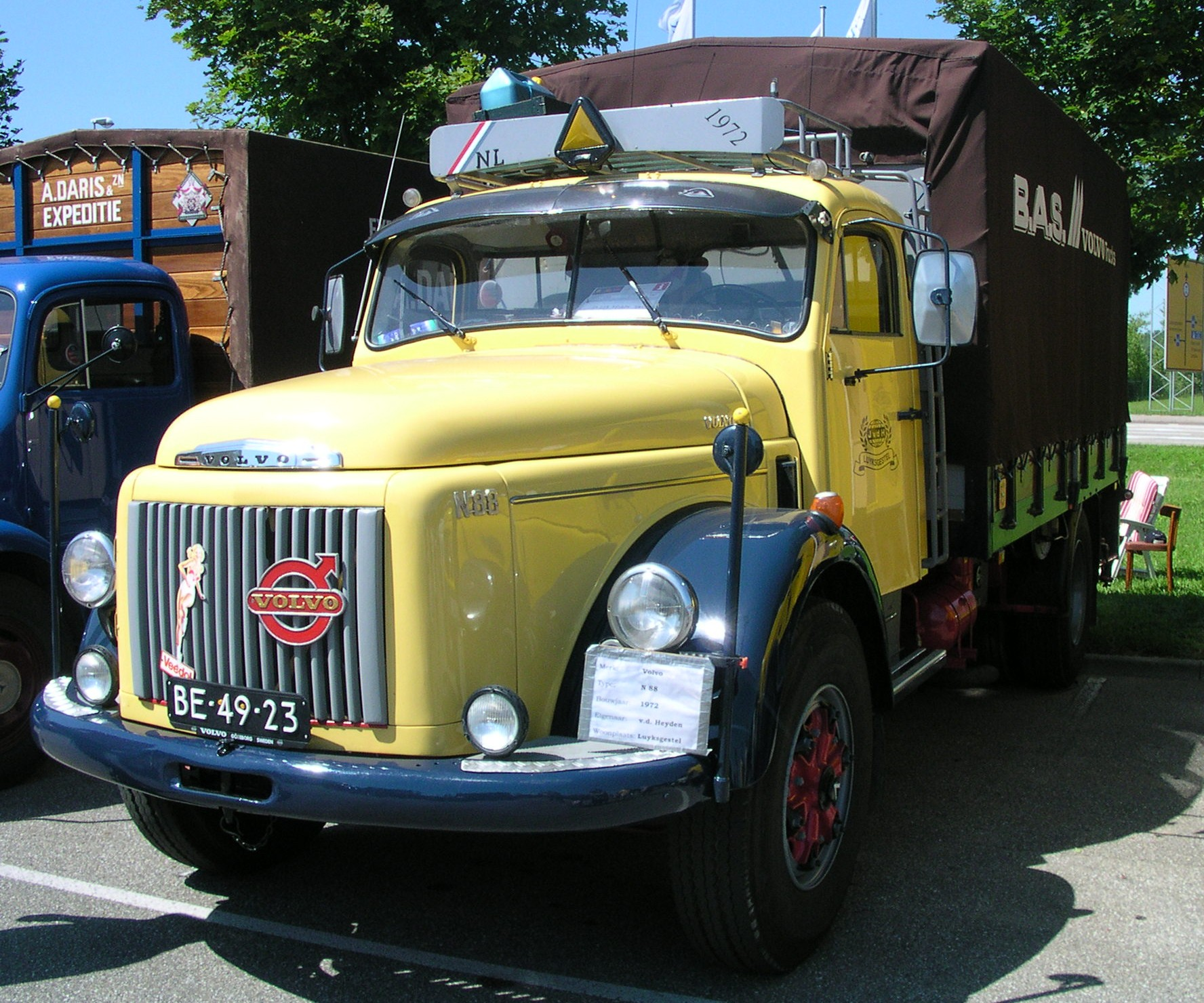 Wörth am Rhein beim Oldtimer-Treffen bei Daimler-Chrysler; Volvo N 88